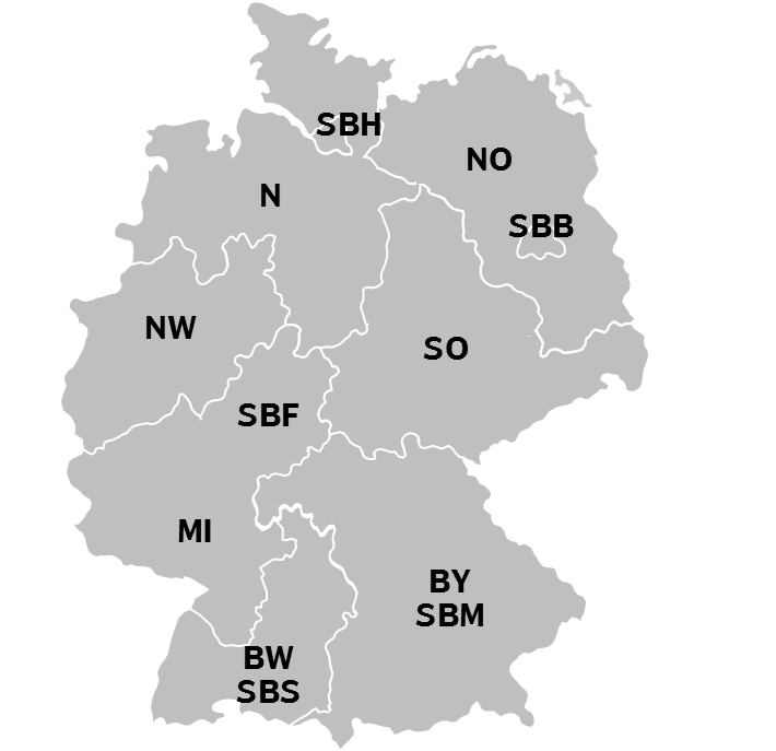 Die Sparte teilt sich in sieben Regionen und fünf direkt aus der Zentrale geführte urbane S-Bahnen sowie die Regio-Netze auf.